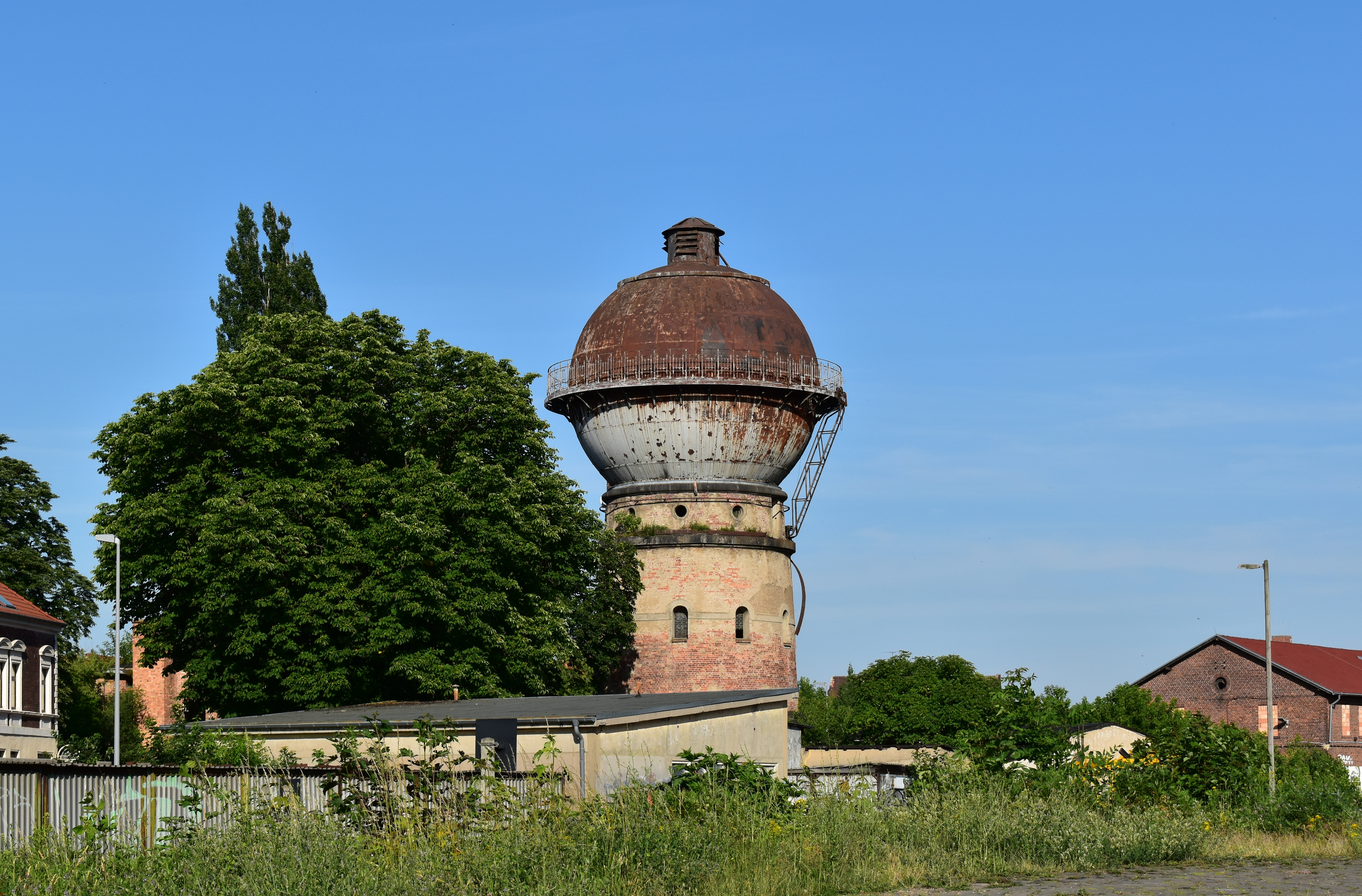 Wasserturm Oststraße in Aschersleben